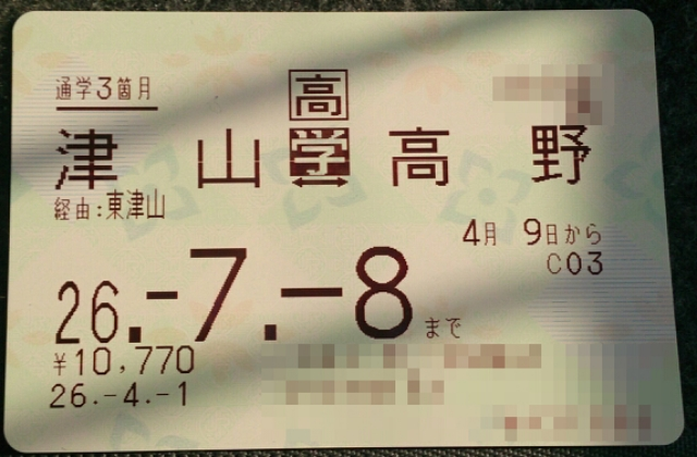 西日本旅客鉄道の通学定期券